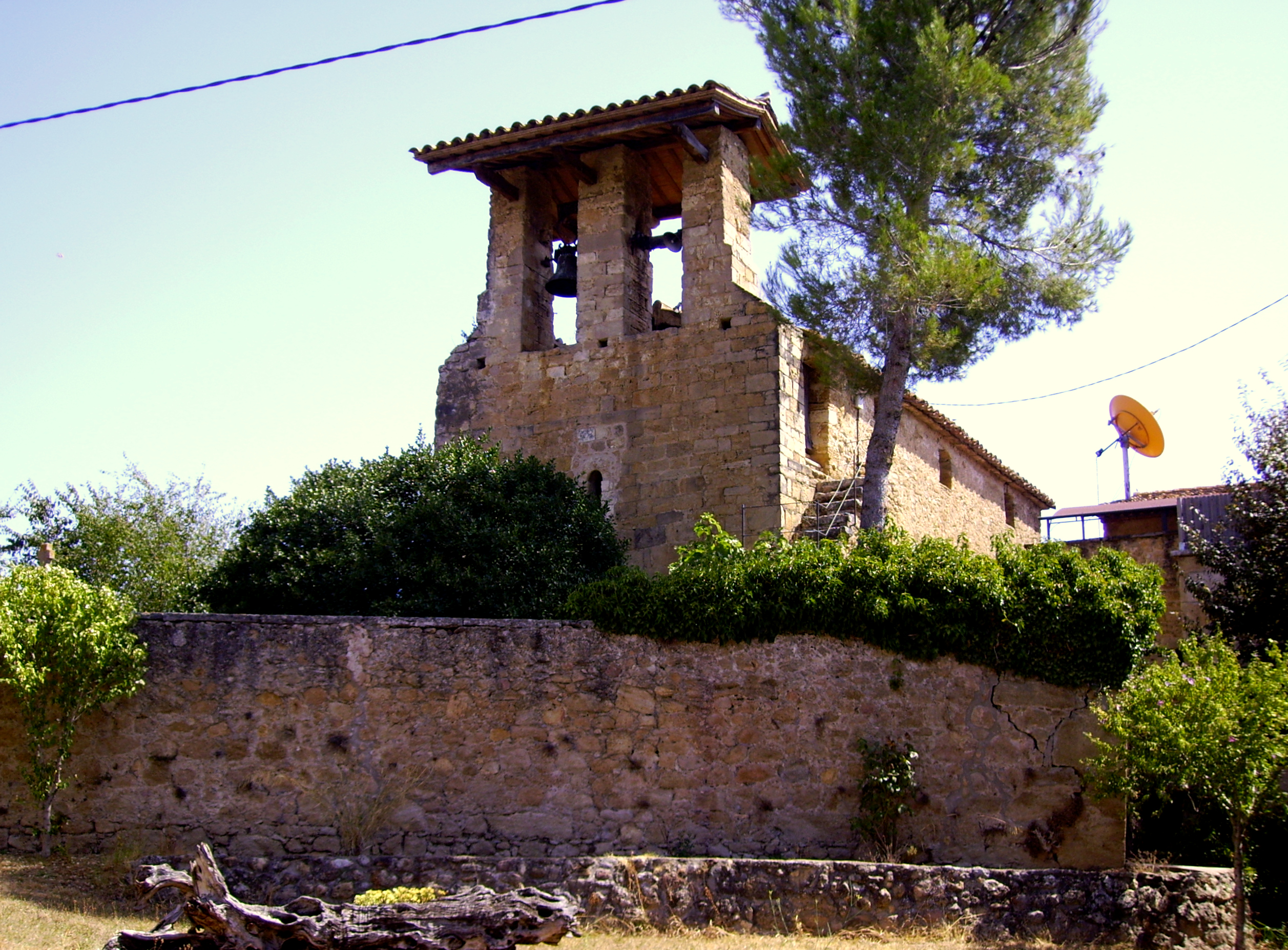 Església parroquial de Santa Eulàlia (Cornellà del Terri)